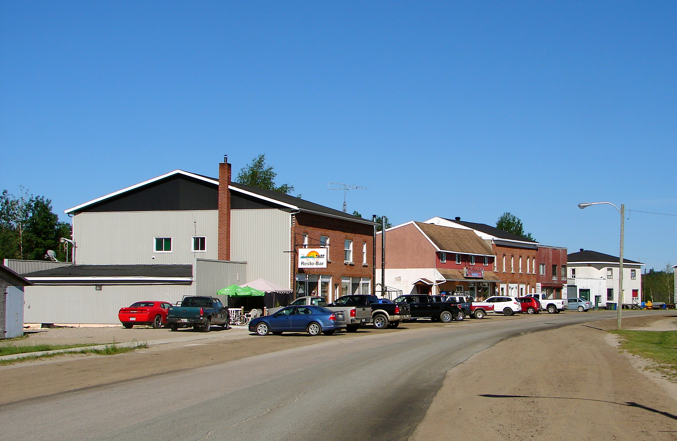 Belleterre, Quebec, Canada